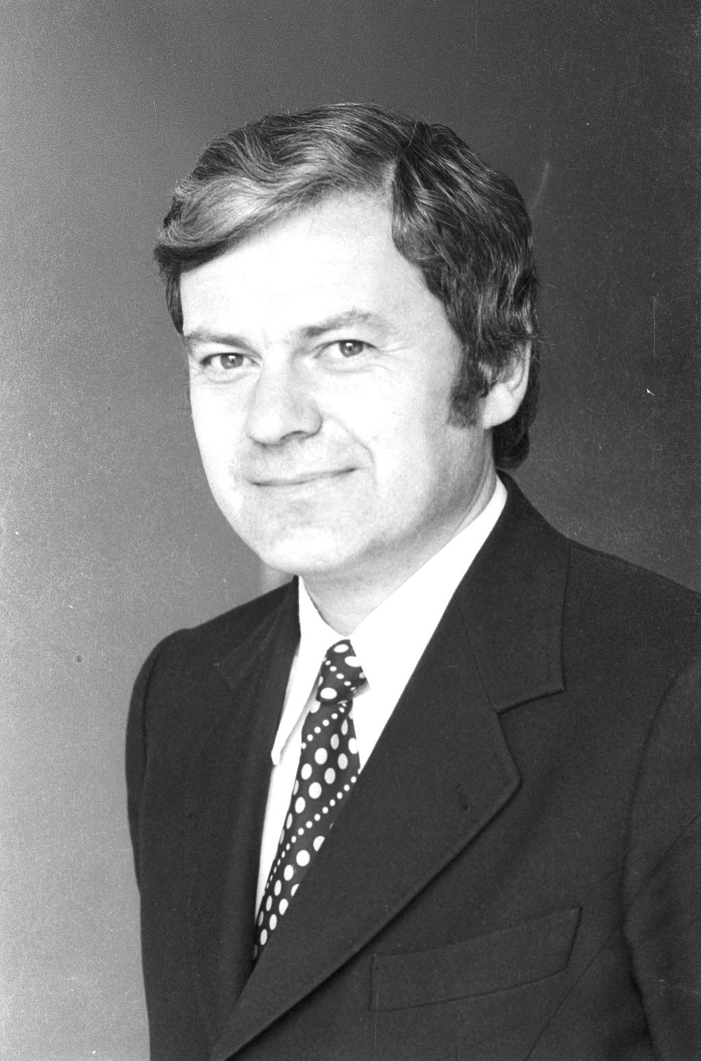 Die CDU-Ratsfraktion nominiert nach dem Wahlsieg in der Kommunalwahl am 24.03.1974 den Rechtsanwalt Eckhard Sauerbaum für das Ehrenamt des Stadtpräsidenten. Sauerbaum war bisher stellvertretender Stadtpräsident.